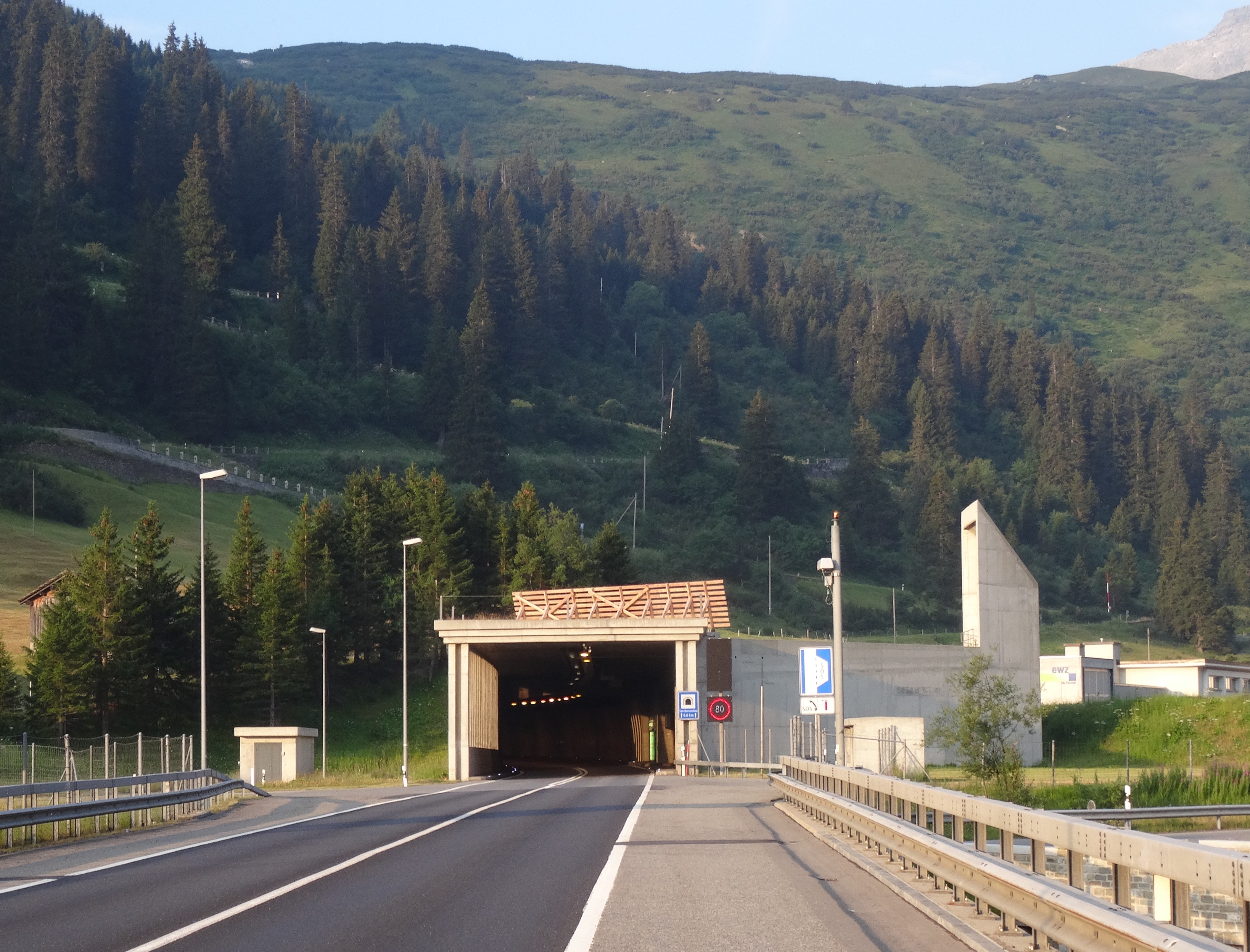 A 13: Nordportal San Bernardino-Tunnel